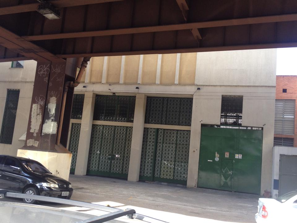 Sede da NGT Rio de Janeiro, localizada no bairro de São Cristóvão.